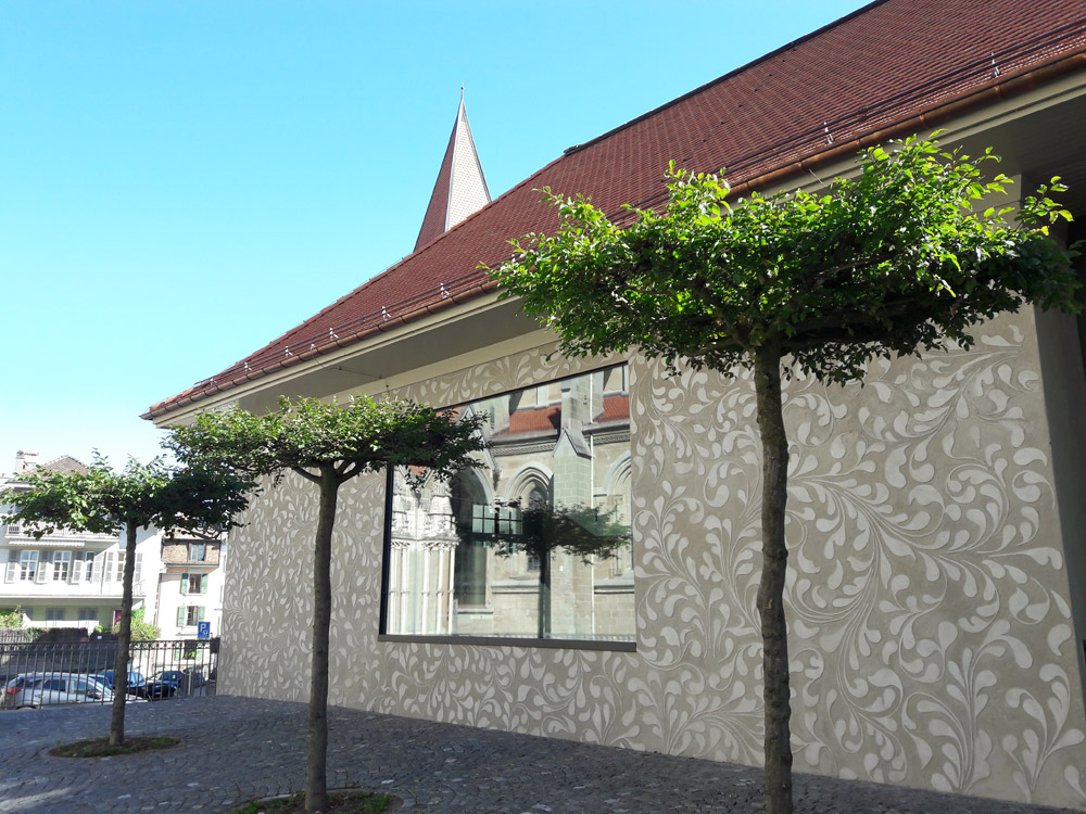 Décoration murale en sgraffito, reflet de la cathédrale de Lausanne sur la fenêtre.